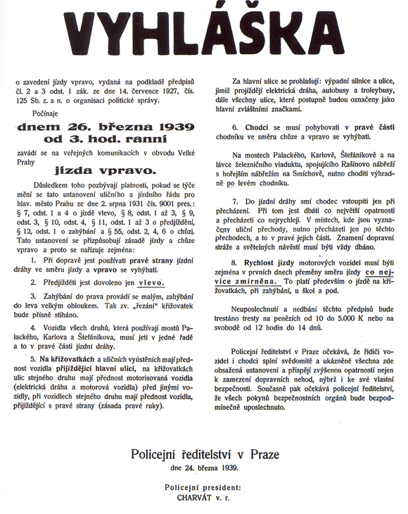 Zavedení jízdy vpravo v Protektorátu Čechy a Morava